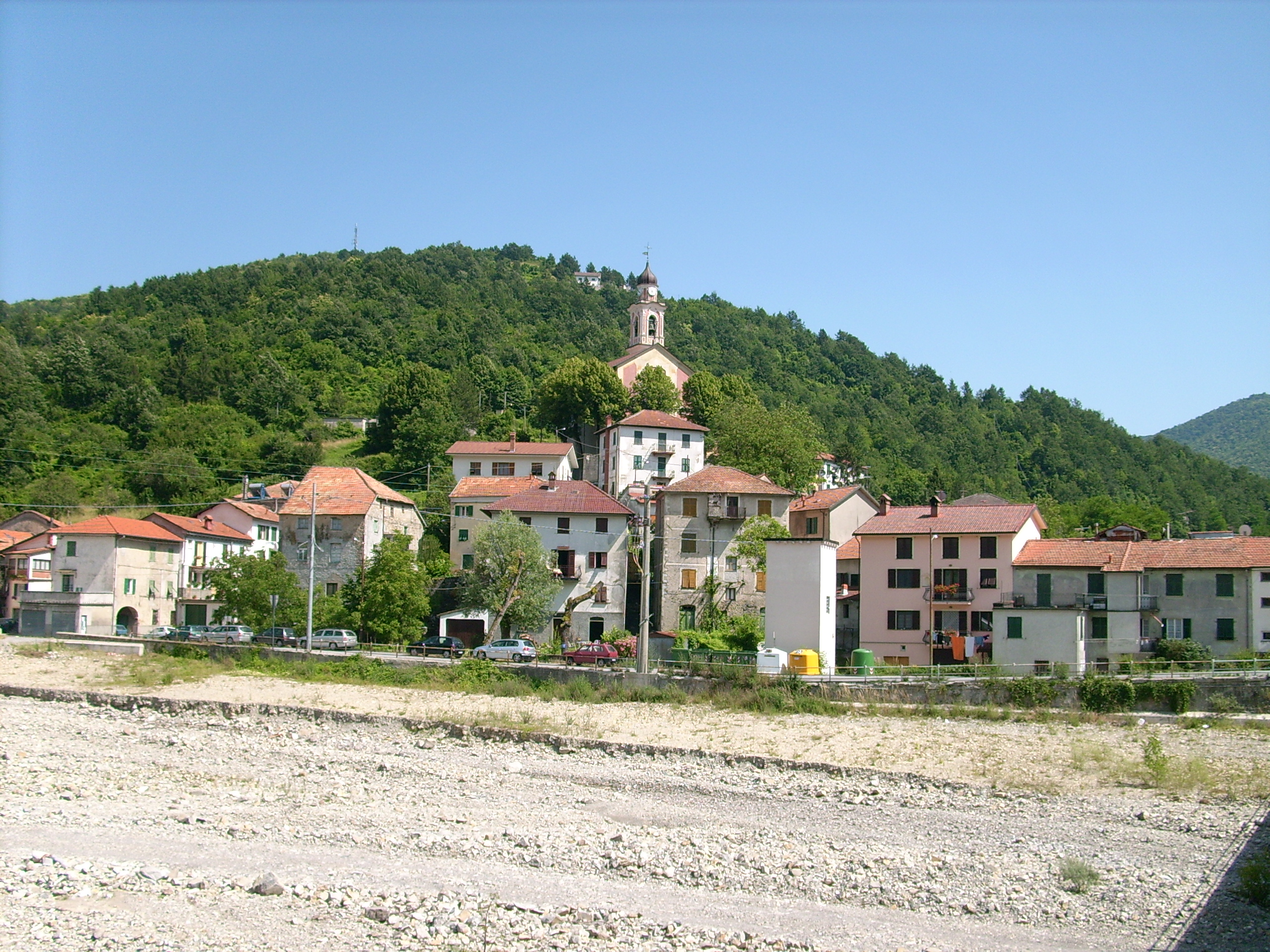 Vobbia, Liguria, Italia